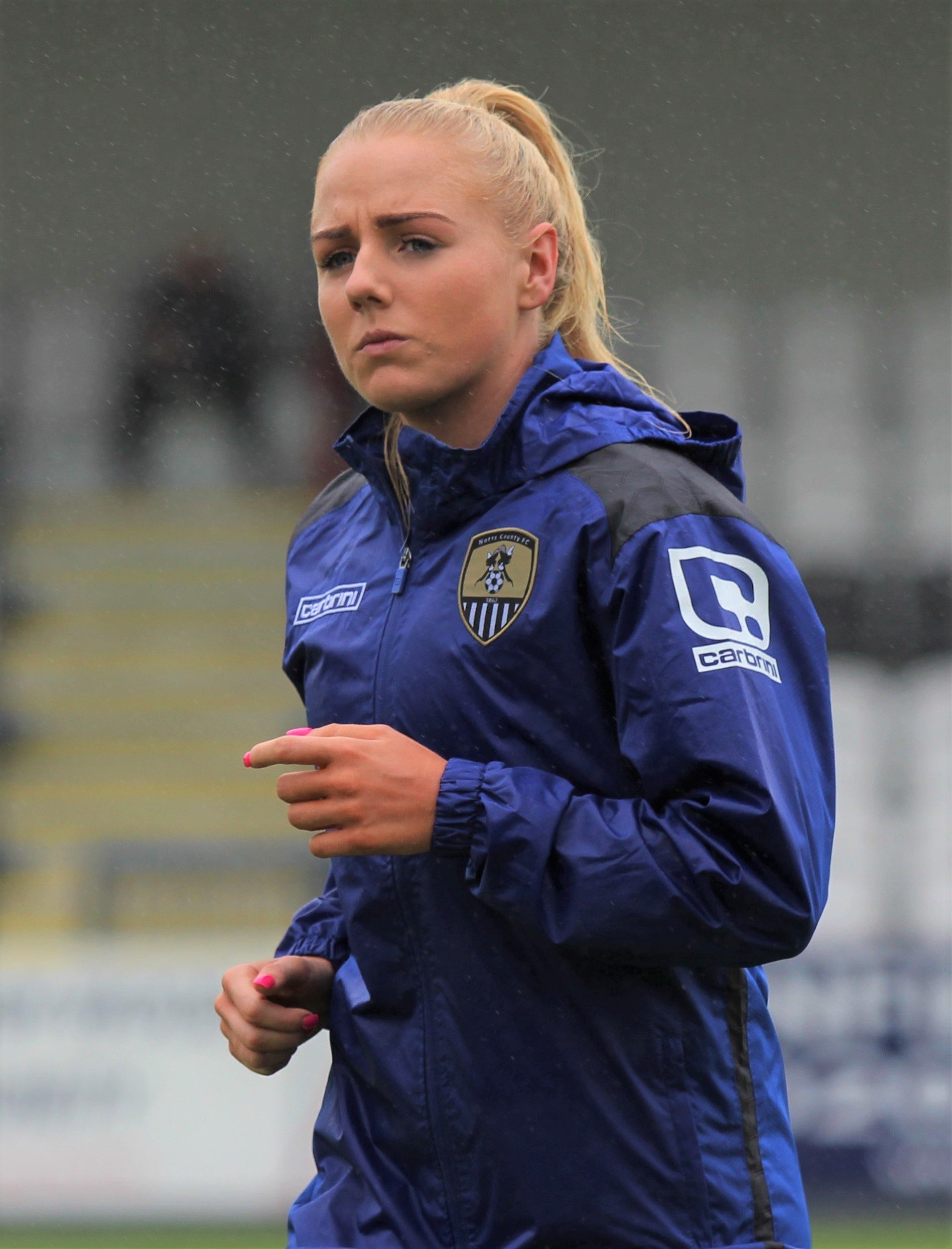 Alex Greenwood avec Notts County en 2015.